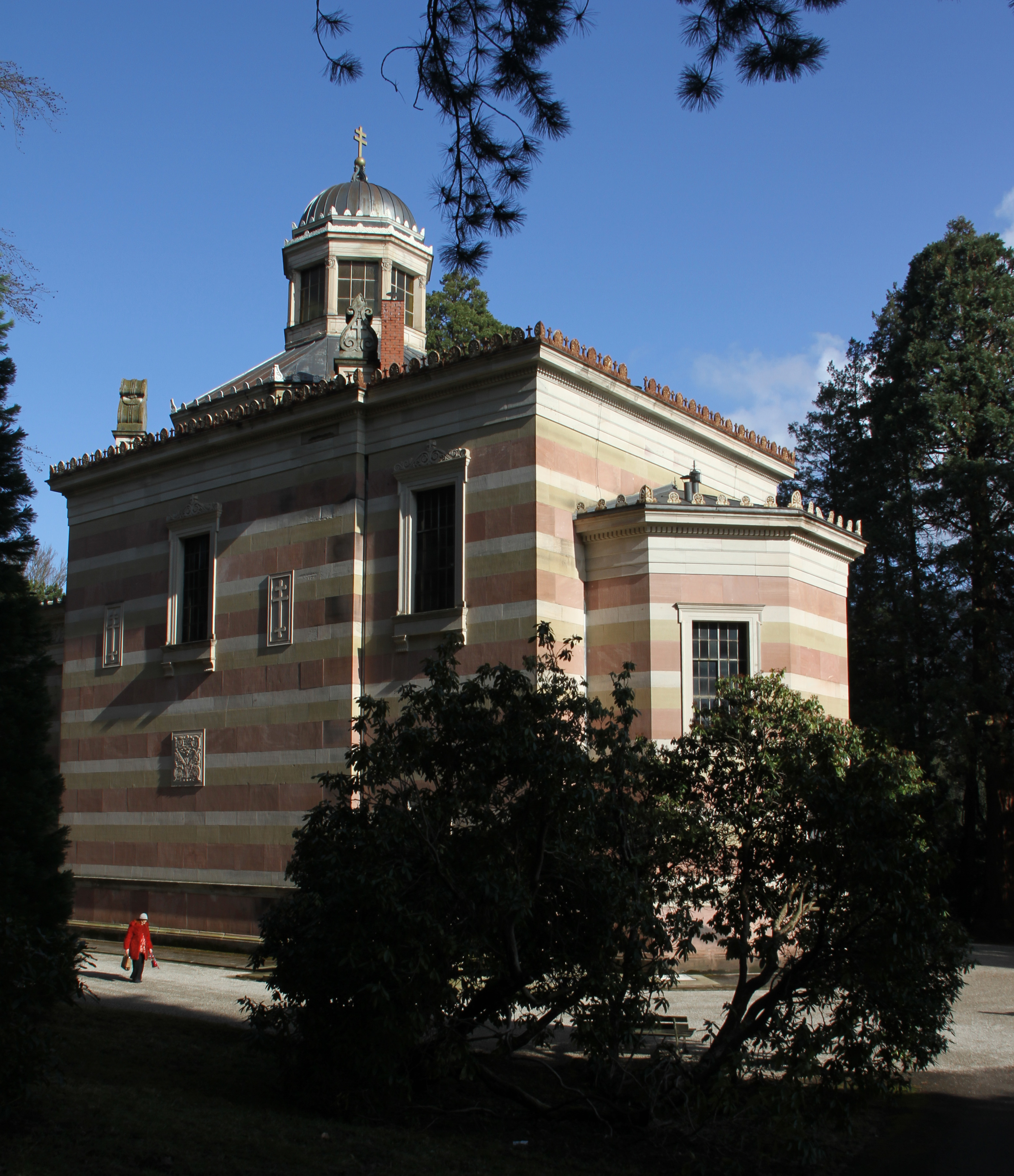 Stourdza-Kapelle